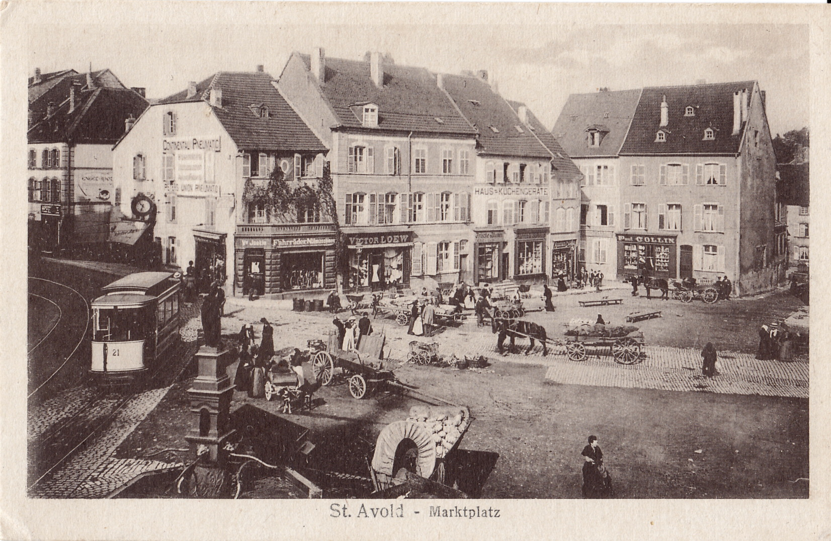 Carte postale ancienne éditée par Verlag Photogr. Atelier Faust à Saint-Avold : SAINT-AVOLD - Marktplatz